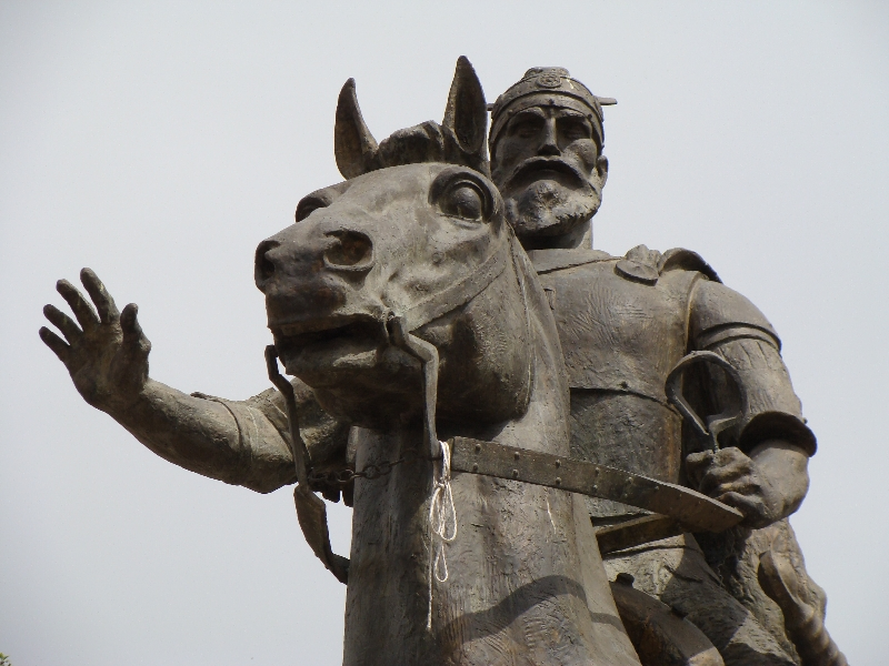 Skanderbeg Monument, Skopje,Macedonia